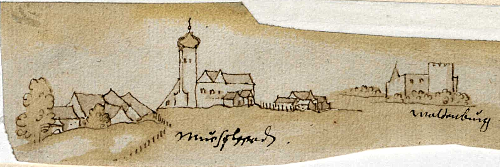 Ansicht der Burg Waldenburg, das heutige Schloss Wallenburg sowie der Stadt Miesbach in Oberbayern aus dem 16. Jhdt. Handzeichnung von Philipp Apian aus der bayerischen Staatsbibliothek München.